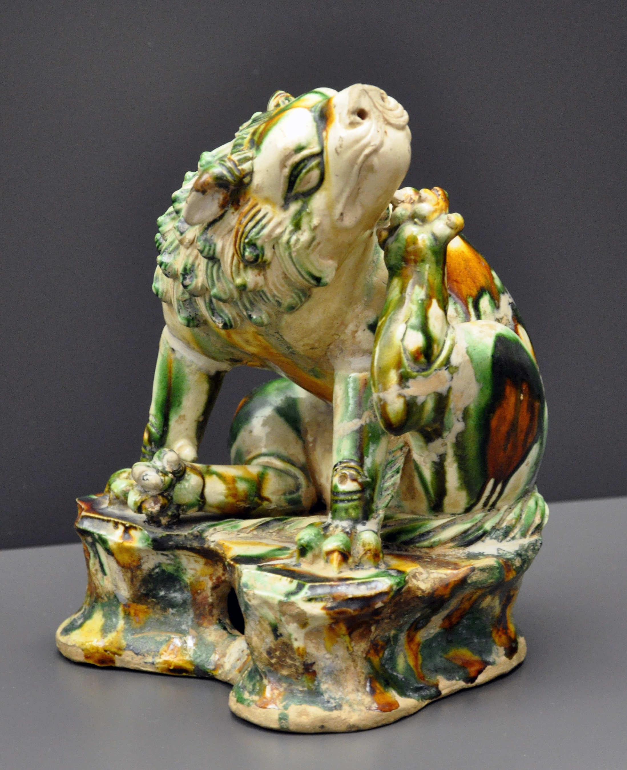 Löwe; Tang-Dynastie, frühes 8. Jahrhundert; Ton mit Dreifarbenglasur Museum Rietberg, Zürich; Inv. Nr. RCH 602